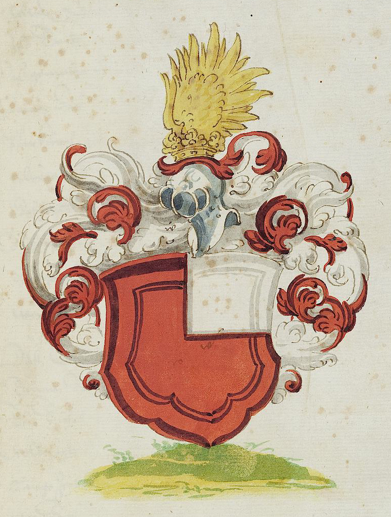 Wappen aus: David Wolleber: Chorographia Württemberg, [Schorndorf] 1591, Universitätsbibliothek Tübingen, Mh 6,1 Wappen Grafen von Aichelberg